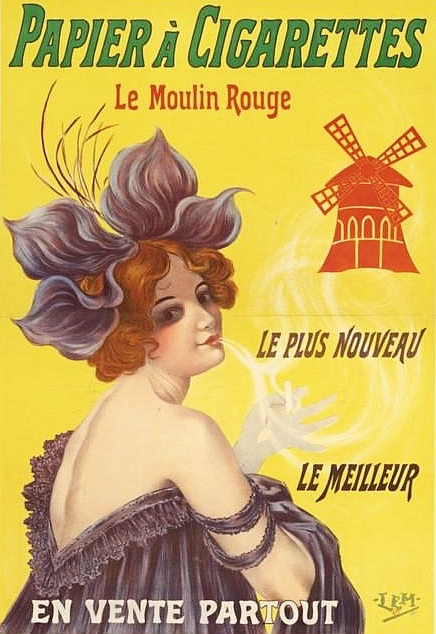 Affiche publicitaire : "Papier à cigarettes Le Moulin Rouge. Le plus nouveau. Le meilleur. En vente partout." Lithigraphie en couleurs par Lem (18??-19??).